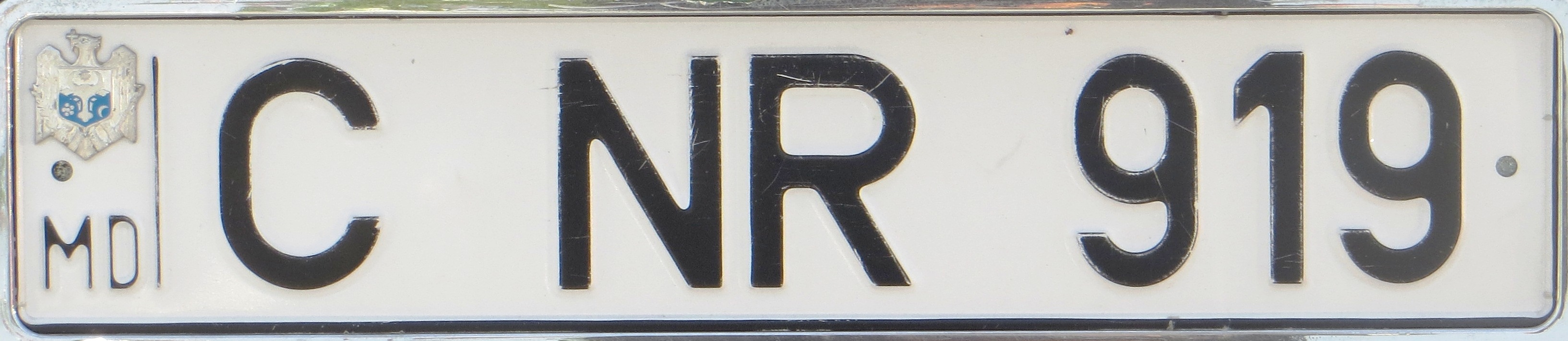 kentekenplaat Moldavië oud